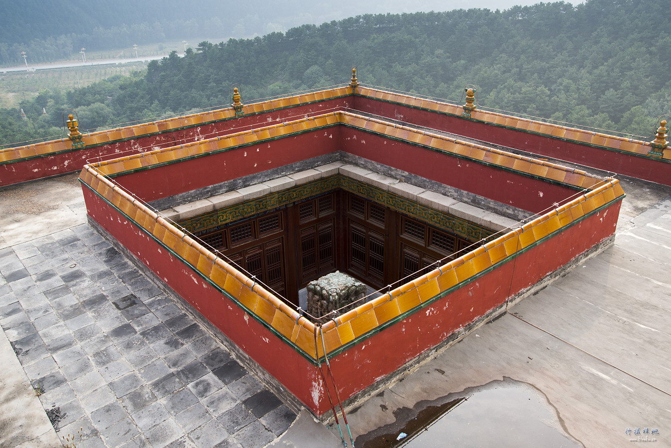 中文（中国大陆）: 白台西侧一座密藏御碑的殿宇